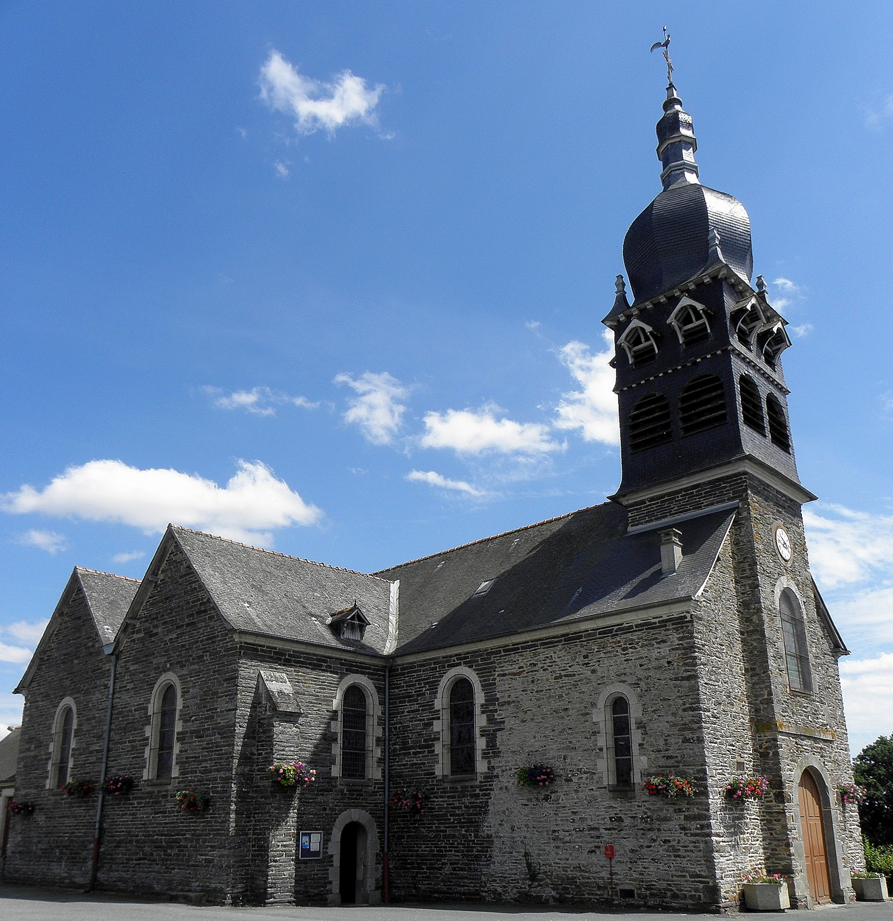 Église Saint-Sulpice d'Ossé (35).